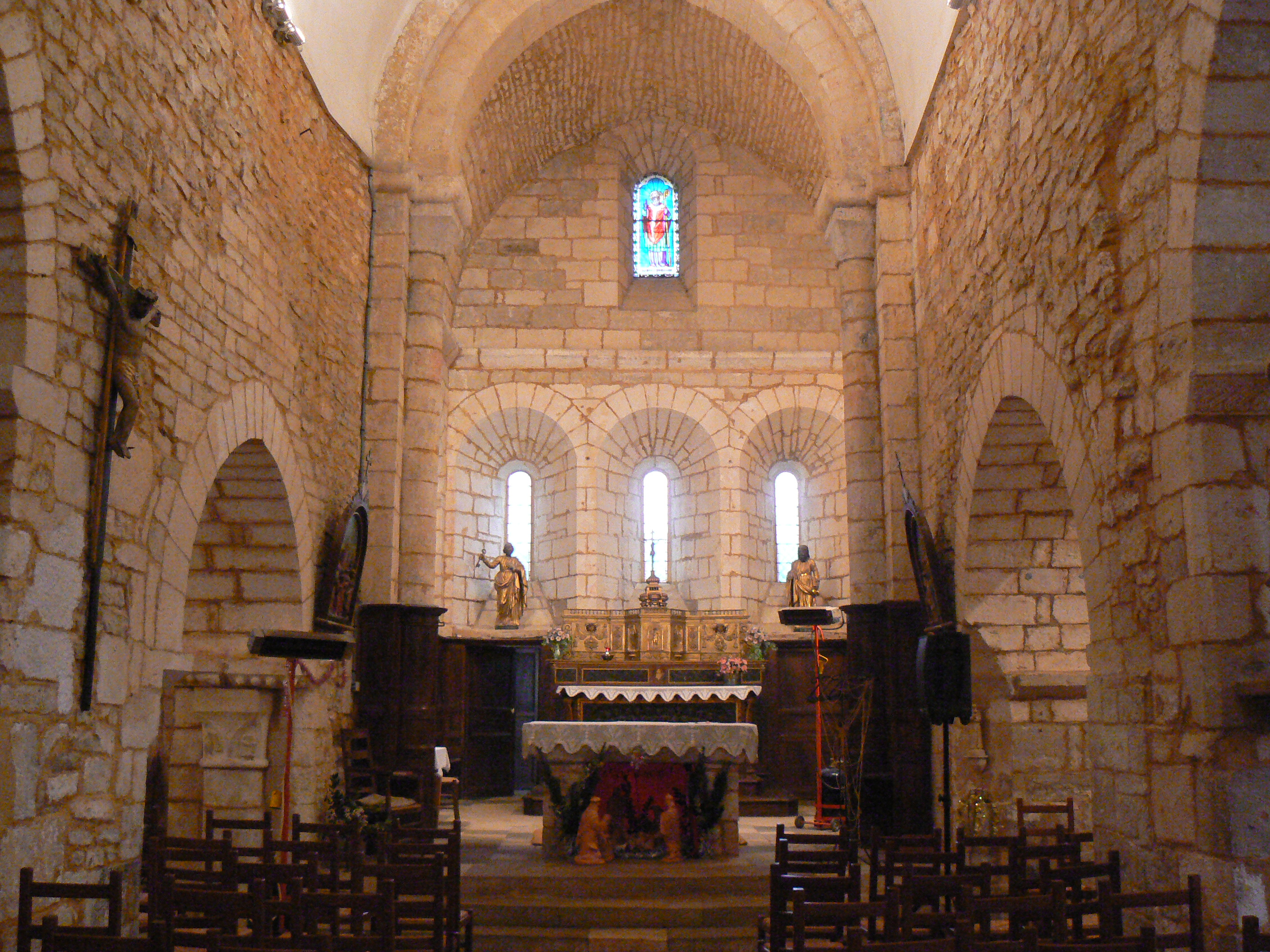 La nef centrale de l'église Saint Martin